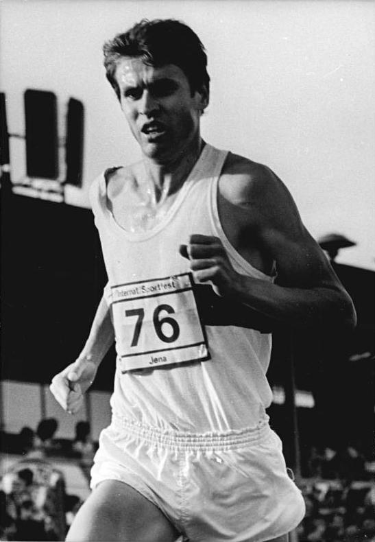 Werner Schildhauer ADN-ZB Kasper 30.5.82 Bez. Gera: Beim Leichtathletik-Pfingstsportfest in Jena sorgte am 29.5. der 22jährige Werner Schildhauer vom SC Chemie Halle mit dem neuen DDR-Rekord über 10.000 m in 27:33,66 min für eine herausragende Leistung. Der Weltpokalsieger von Rom verbesserte seine eigene Bestmarke damit um fast fünf Sekunden.